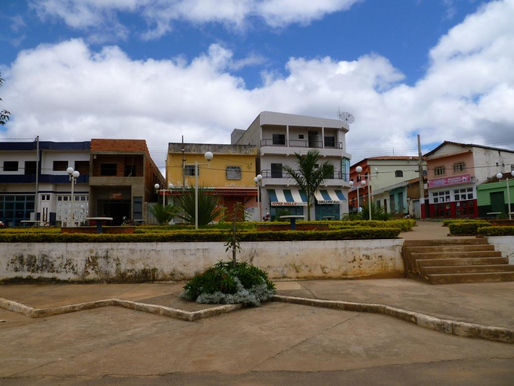 Parte do centro urbano de Vargem Grande do Rio Pardo, Minas Gerais, Brasil.